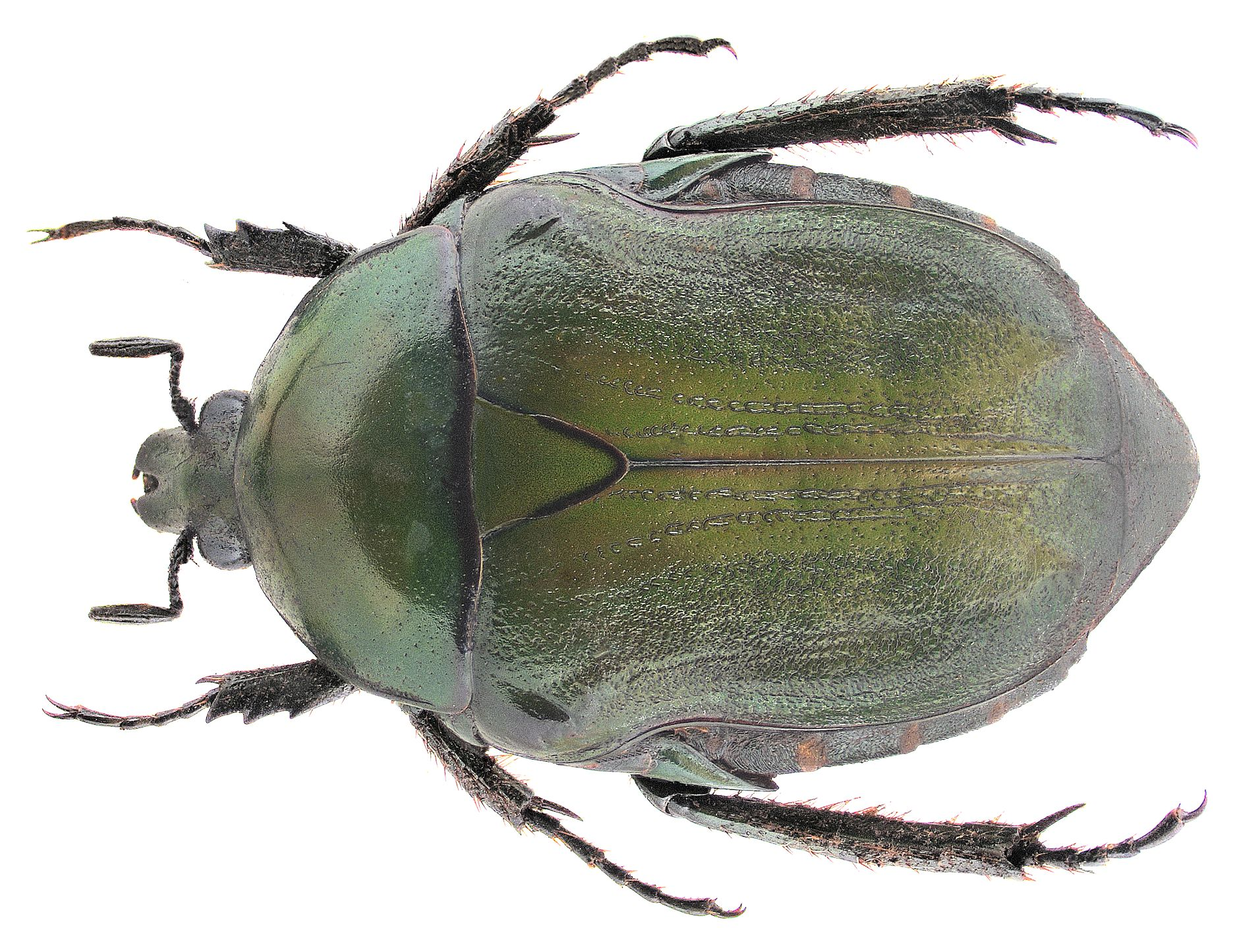 Familie: Scarabaeidae Grösse: 24mm Fundort: Madagascar, Ambablampy, 1965 det. U.Schmidt, 2006 Foto: U.Schmidt, 2006